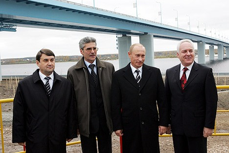 Ярославль. Президент Российской Федерации Владимир Путин с Министром транспорта Игорем Левитиным (слева) директором мостоотряда №6 Сергеем Галкиным и губернатором Ярославской области Анатолием Лисицыным у нового моста «Юбилейный».